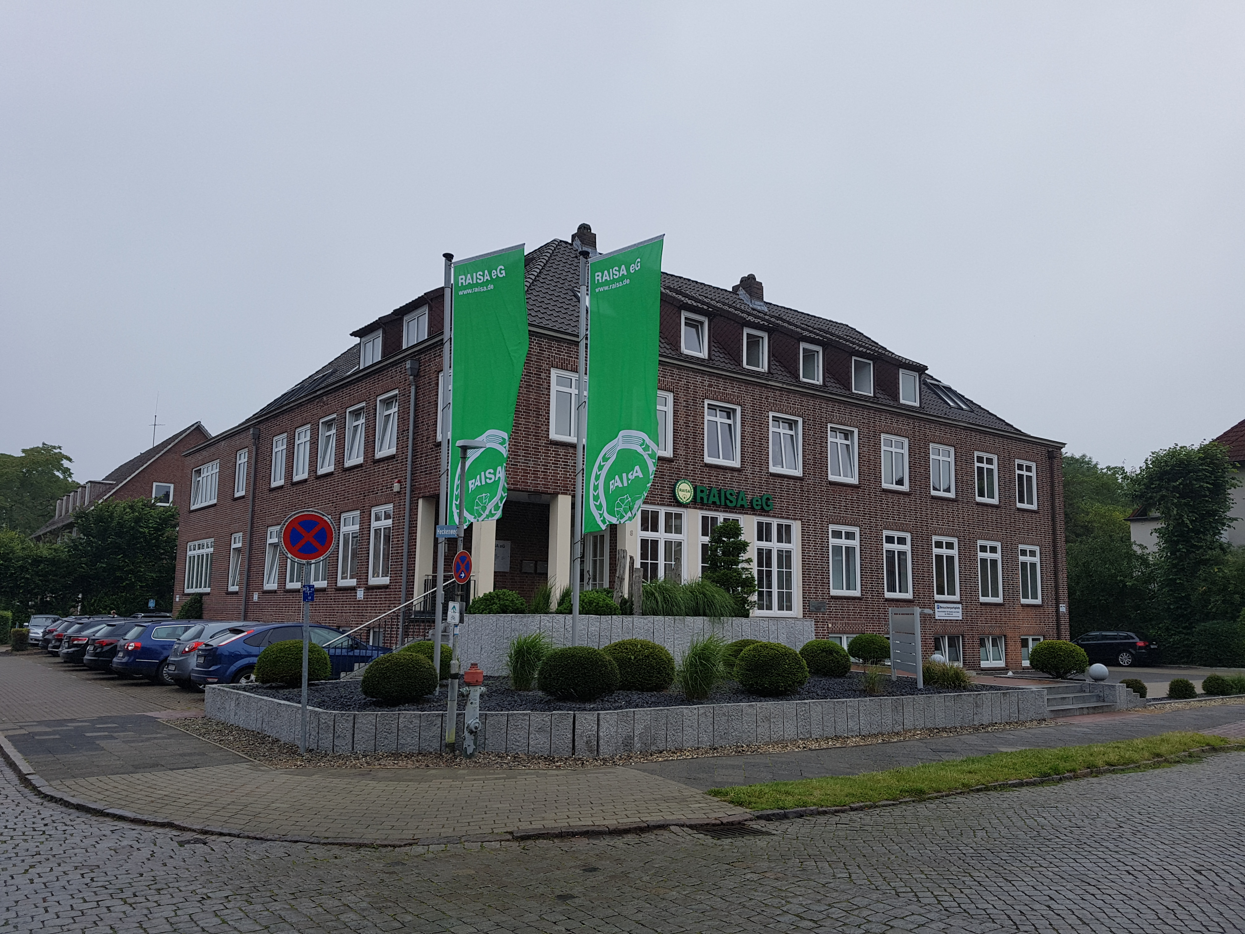 Seet von de Raisa eG in Stood